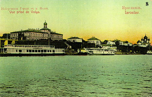 Набережная города с реки Волги. Ярославль. Vue prise de Volga. Iaroslav.